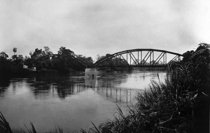 Foto. De spoorbrug van de Deli-spoorlijn over de rivier (Sungei Wampoe ?), oostkust Sumatra